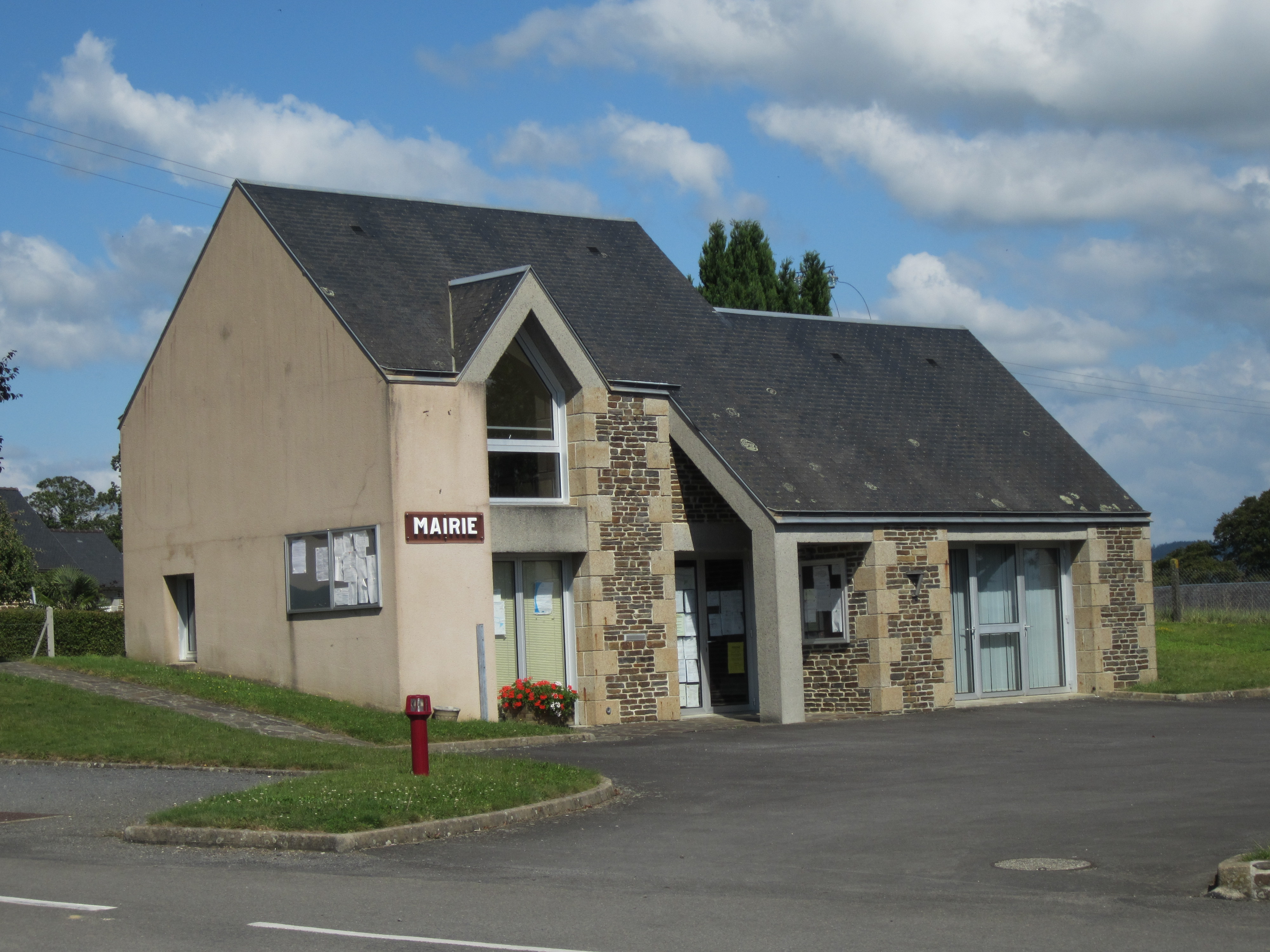 Fontenay, Manche